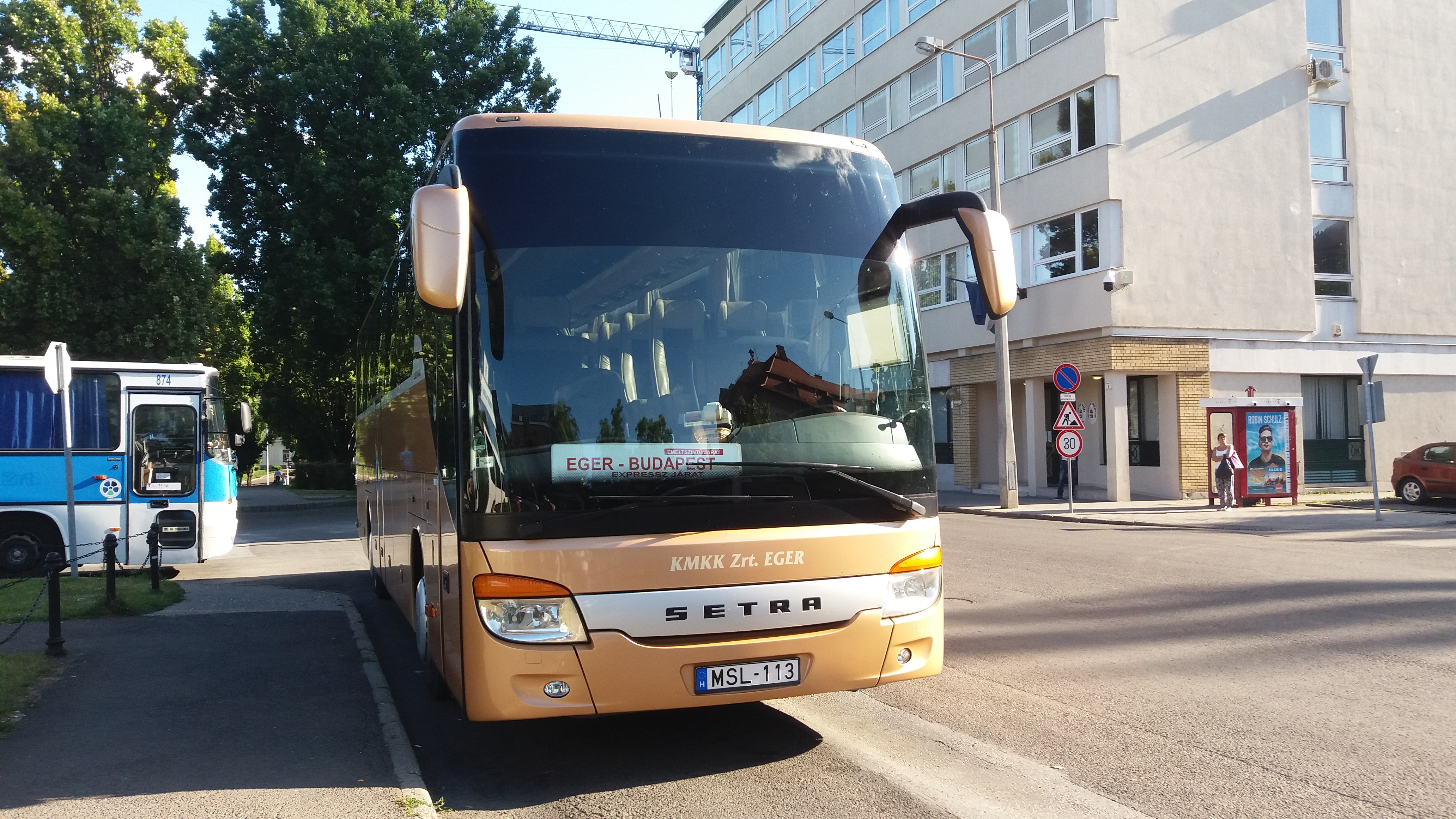 Setra S 415 GT-HD autóbusz Egerben az 1050-es buszjáraton